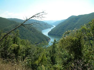 River Mesta, Rodopis